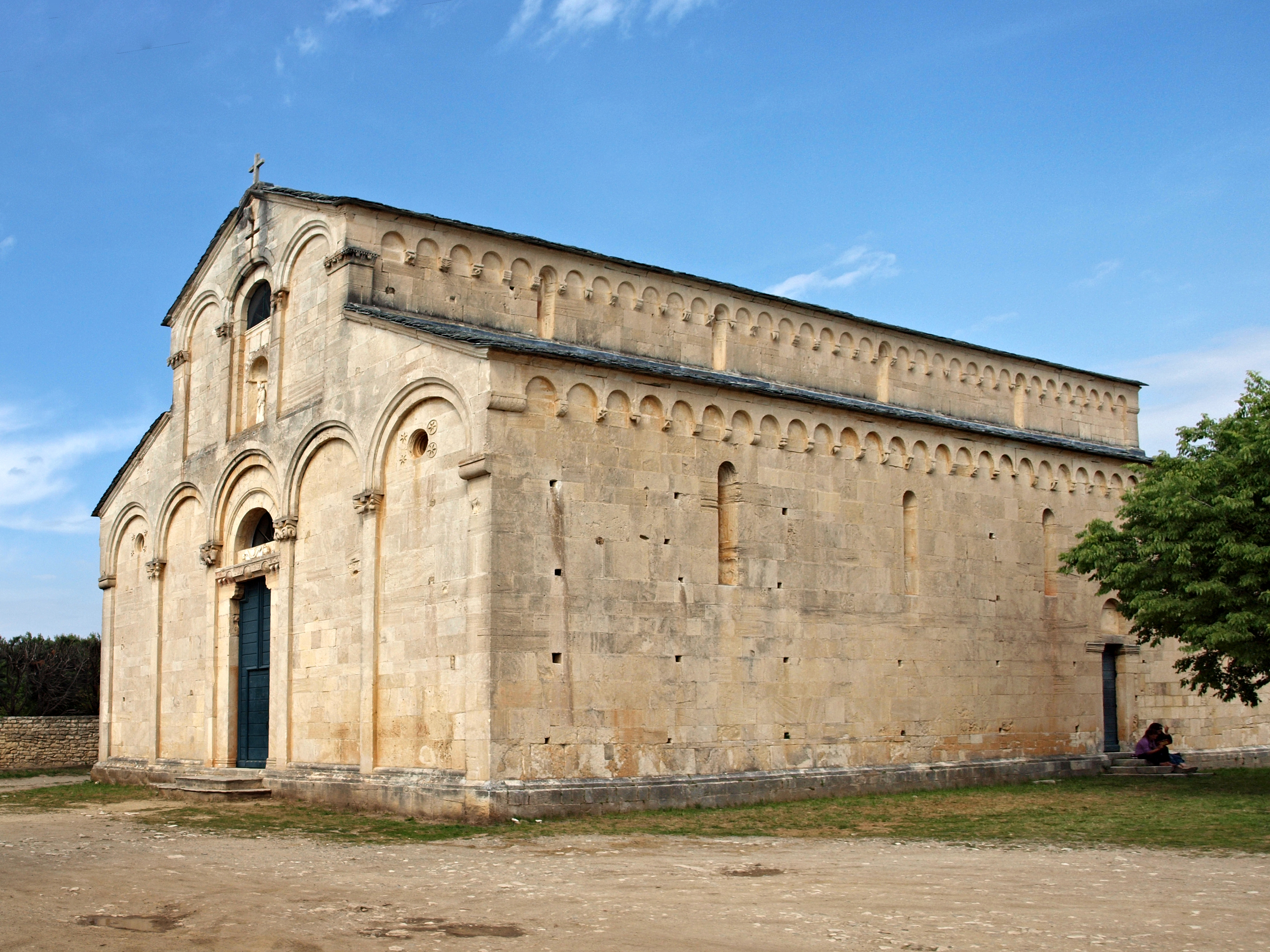 Saint-Florent, Nebbio (Corse) - Façades occidentale et sud de l'ancienne cathédrale du Nebbiu